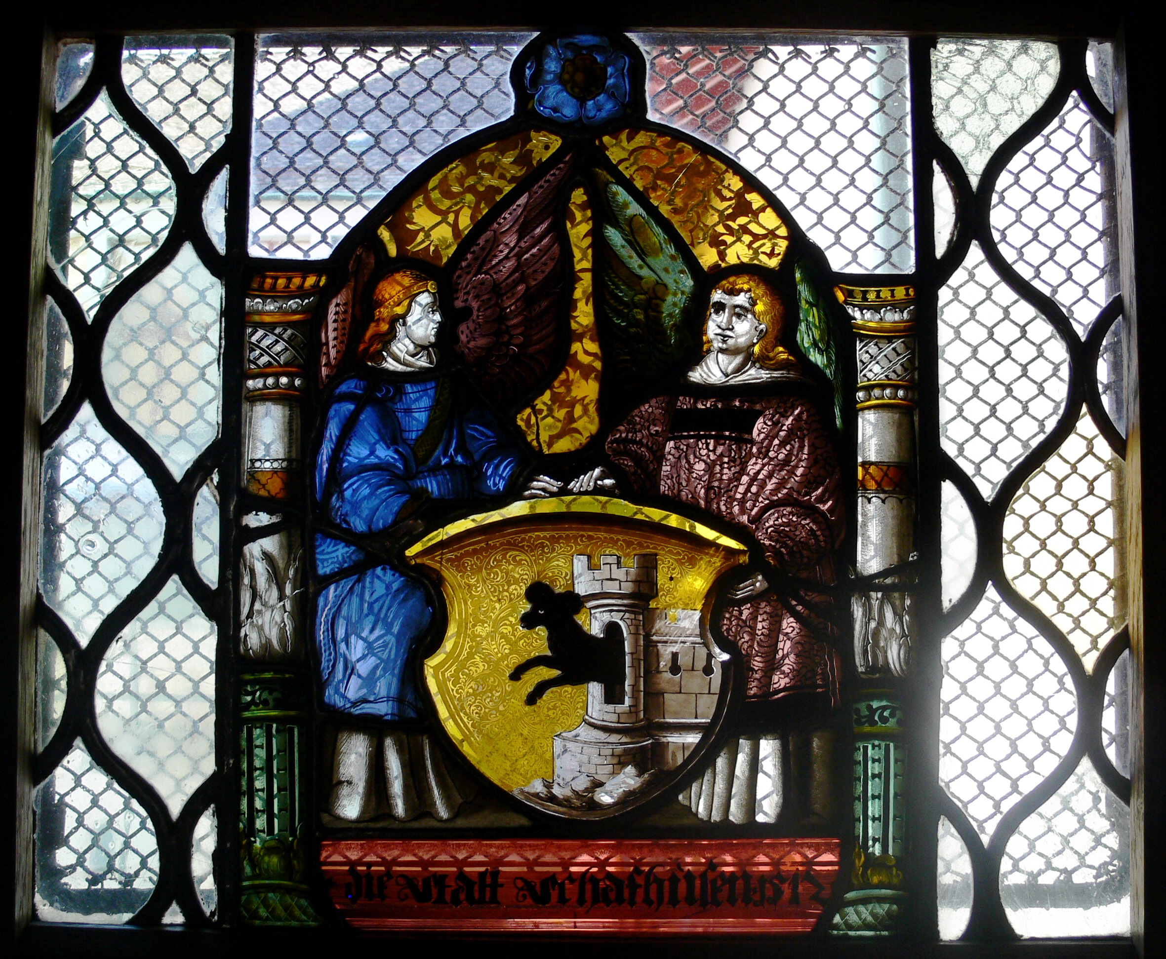 Schaffhausen, Museum zu Allerheiligen Wappenscheibe der Stadt Schaffhausen